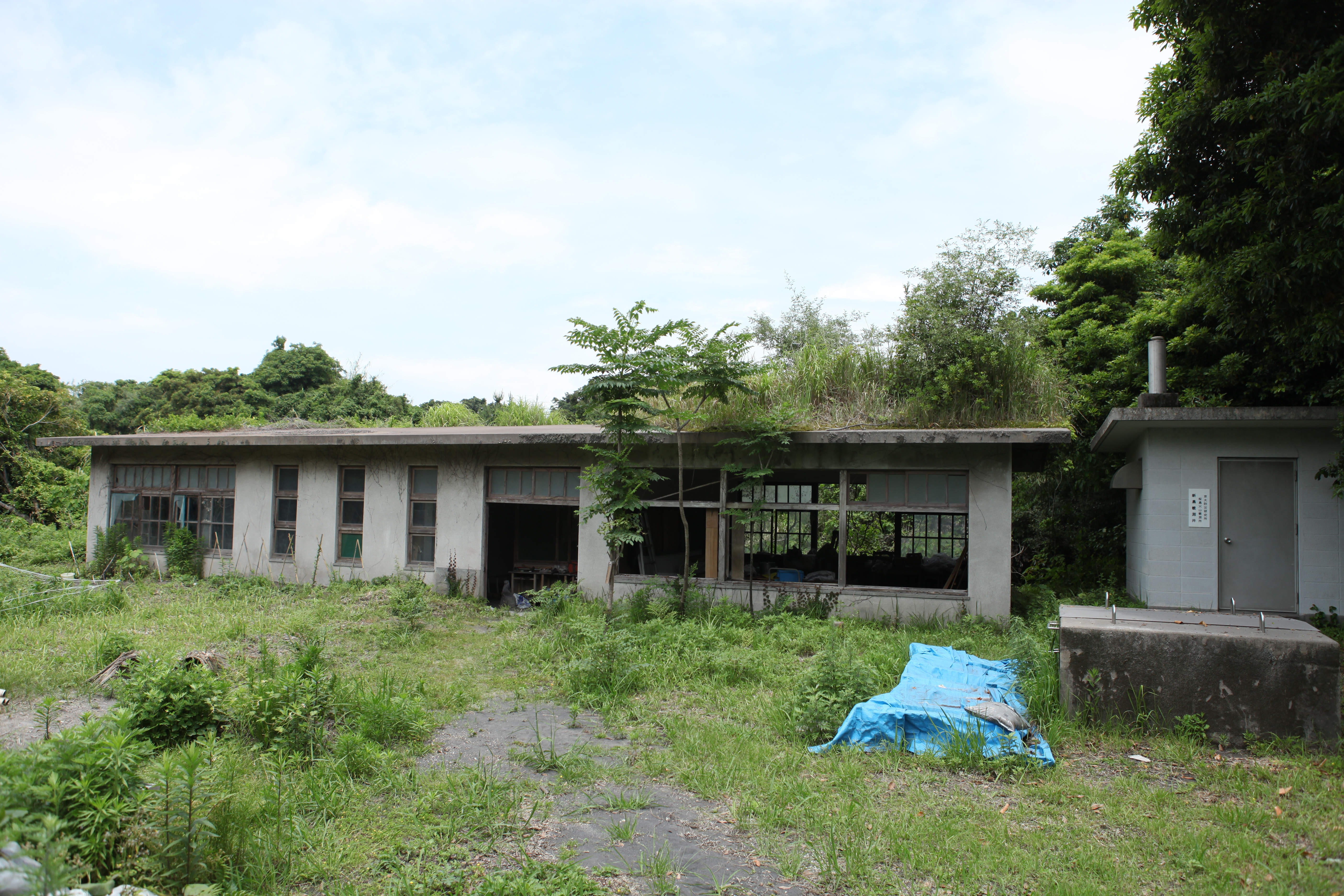 新島にある西桜島村立桜峰小学校新島分校の跡地。校舎の右に見えるのは京都大学の観測井である。